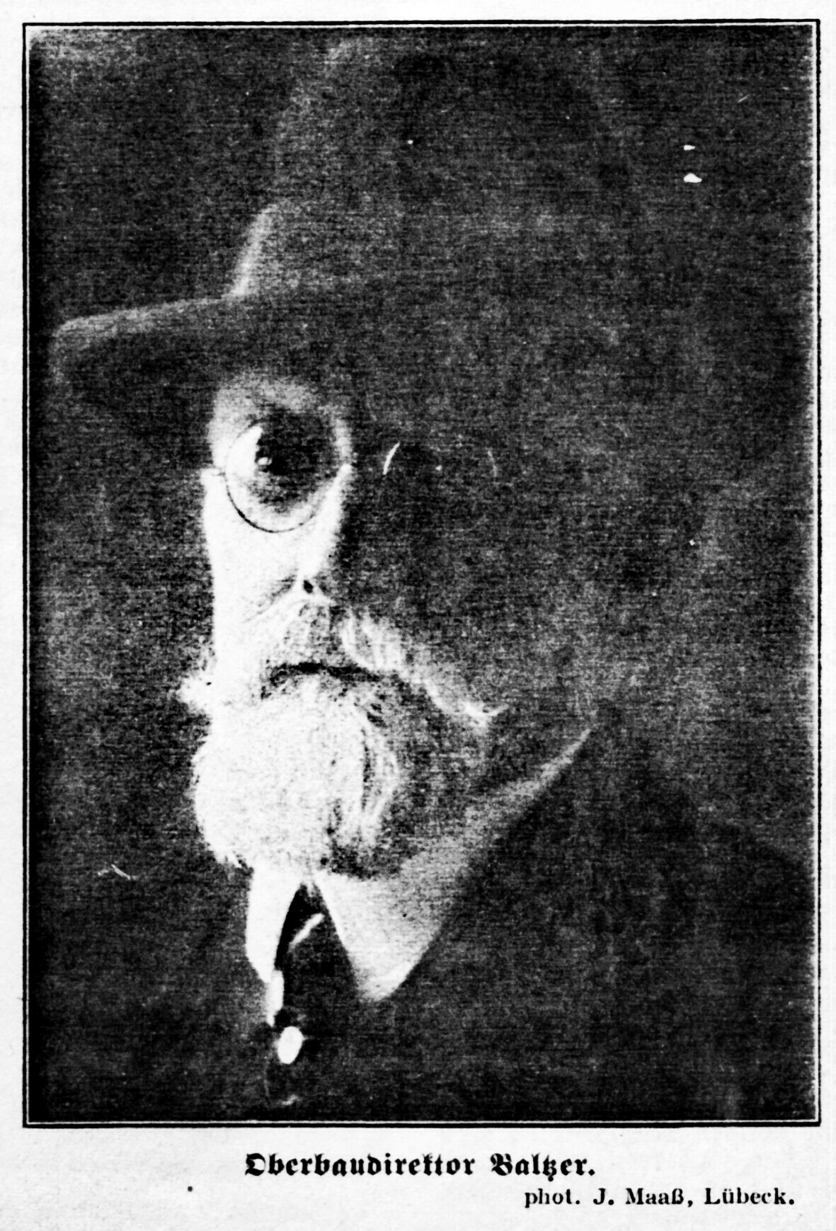 Johannes Baltzer (* 4. Dezember 1862 in Bielefeld; † 25. Juni 1940 in Lübeck), Architekt, Denkmalpfleger und Oberbaudirektor in Lübeck